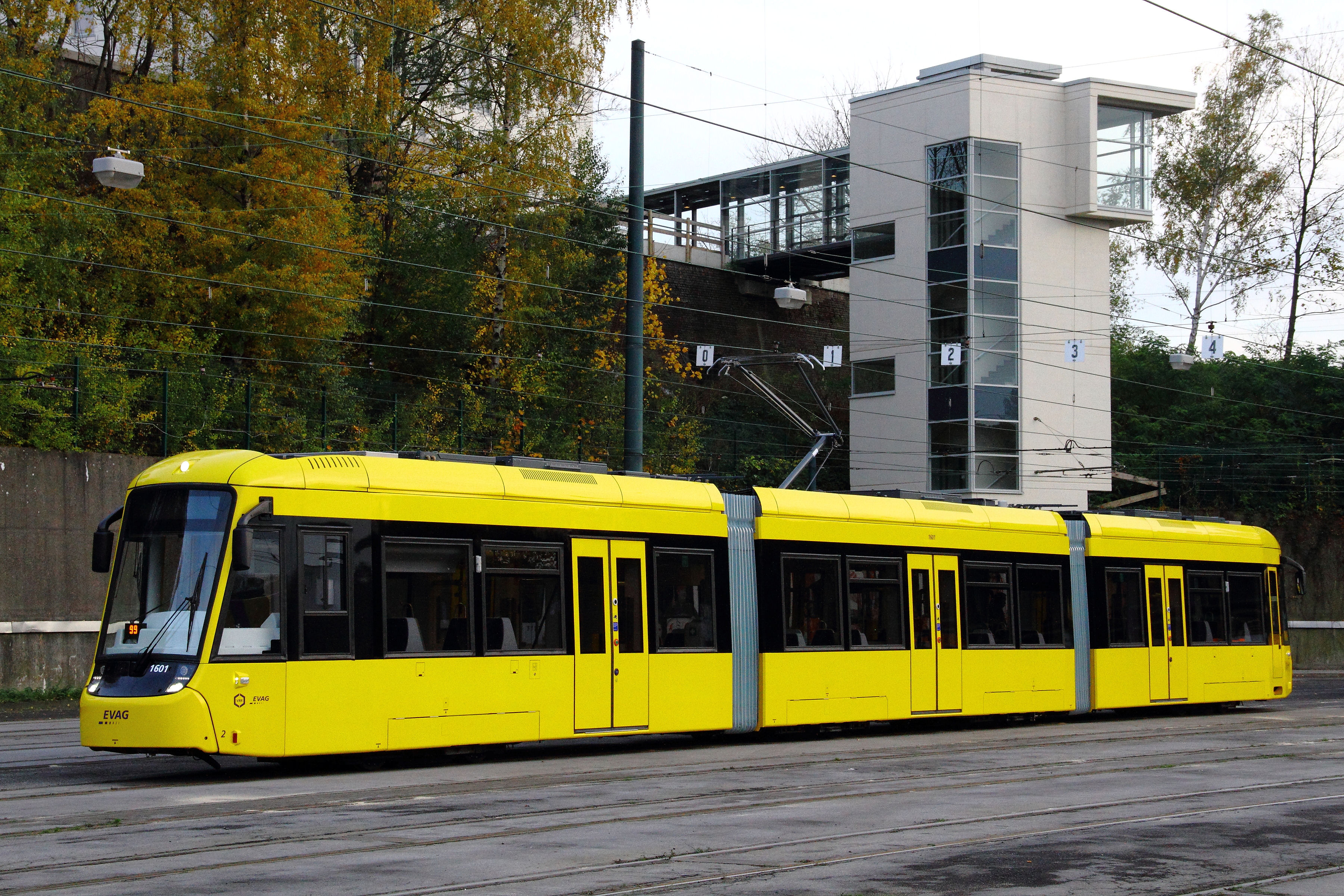 Flexity Classic II, Essen